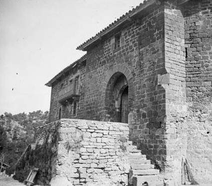 Imatge